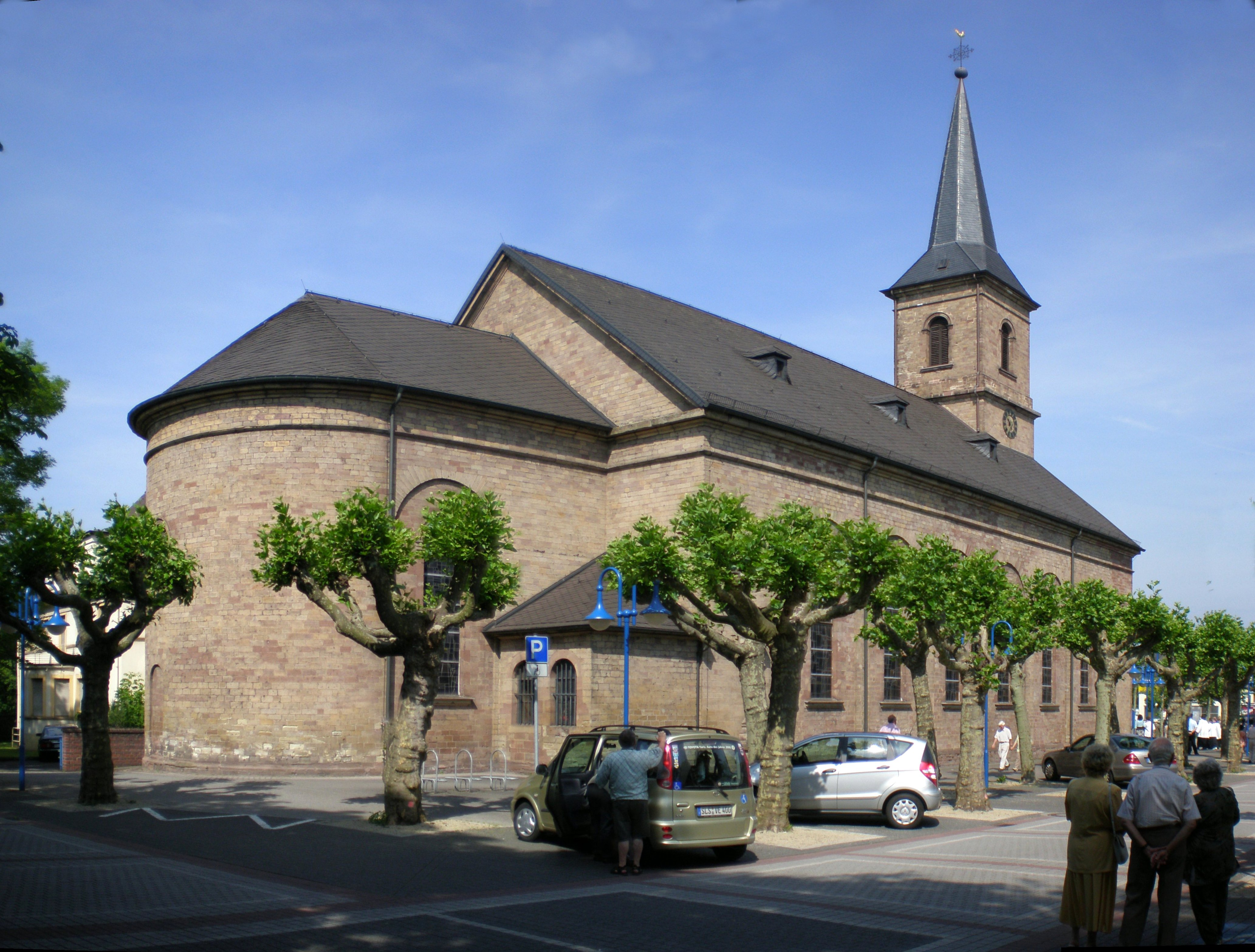 Dillingen Sankt Johann